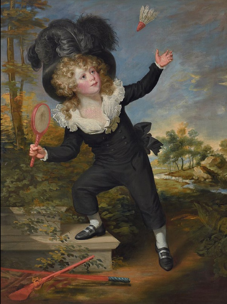 William Beechey (1753-1839) Portrait de Kenneth Dixon jouant au volant, vers 1790 Huile sur toile - 135 x 100 cm Copenhague, Statens Museum for Kunst Photo : Matthiesen Gallery